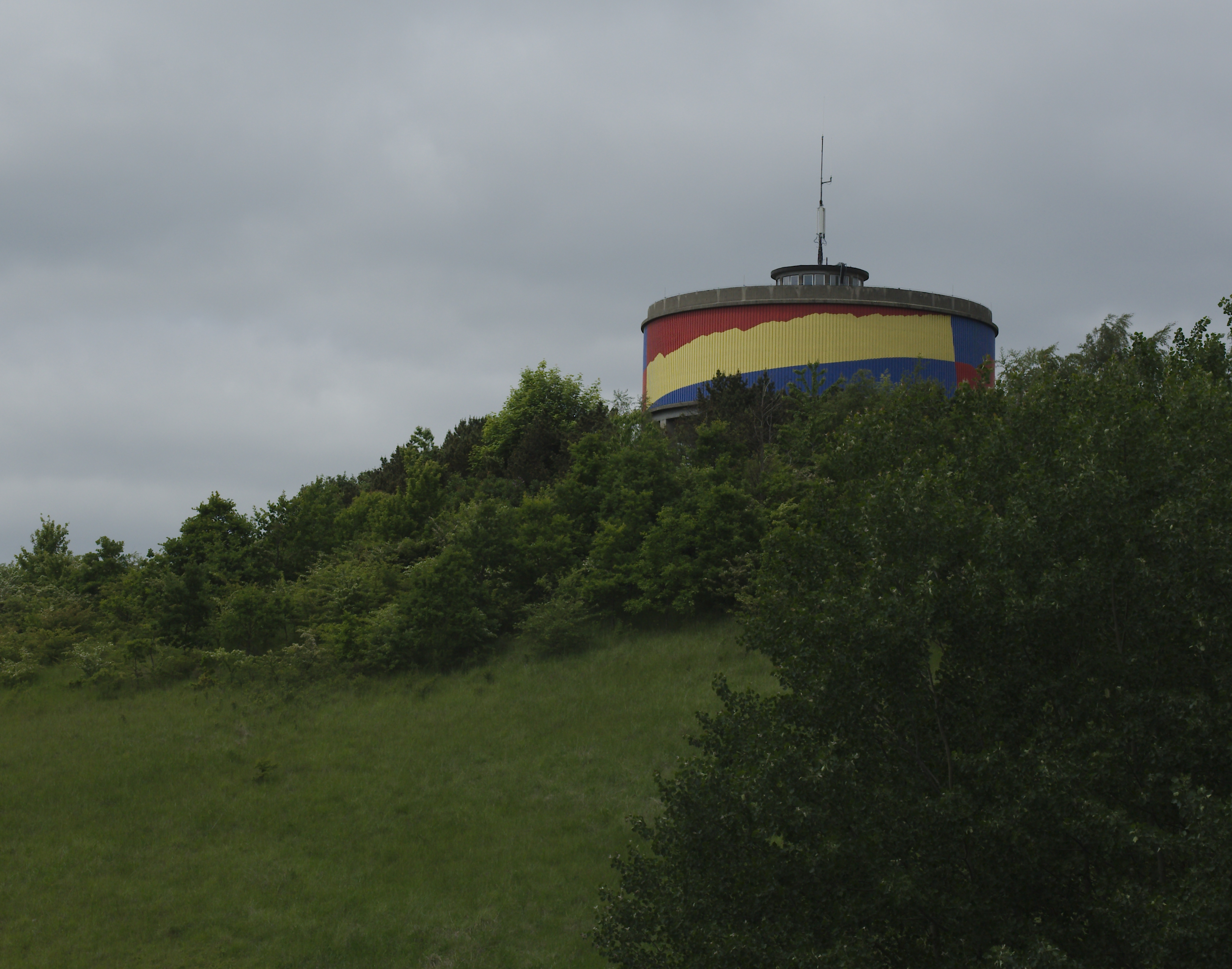 Sorø vandtårn (Pedersborg) set fra broen over motorvejen